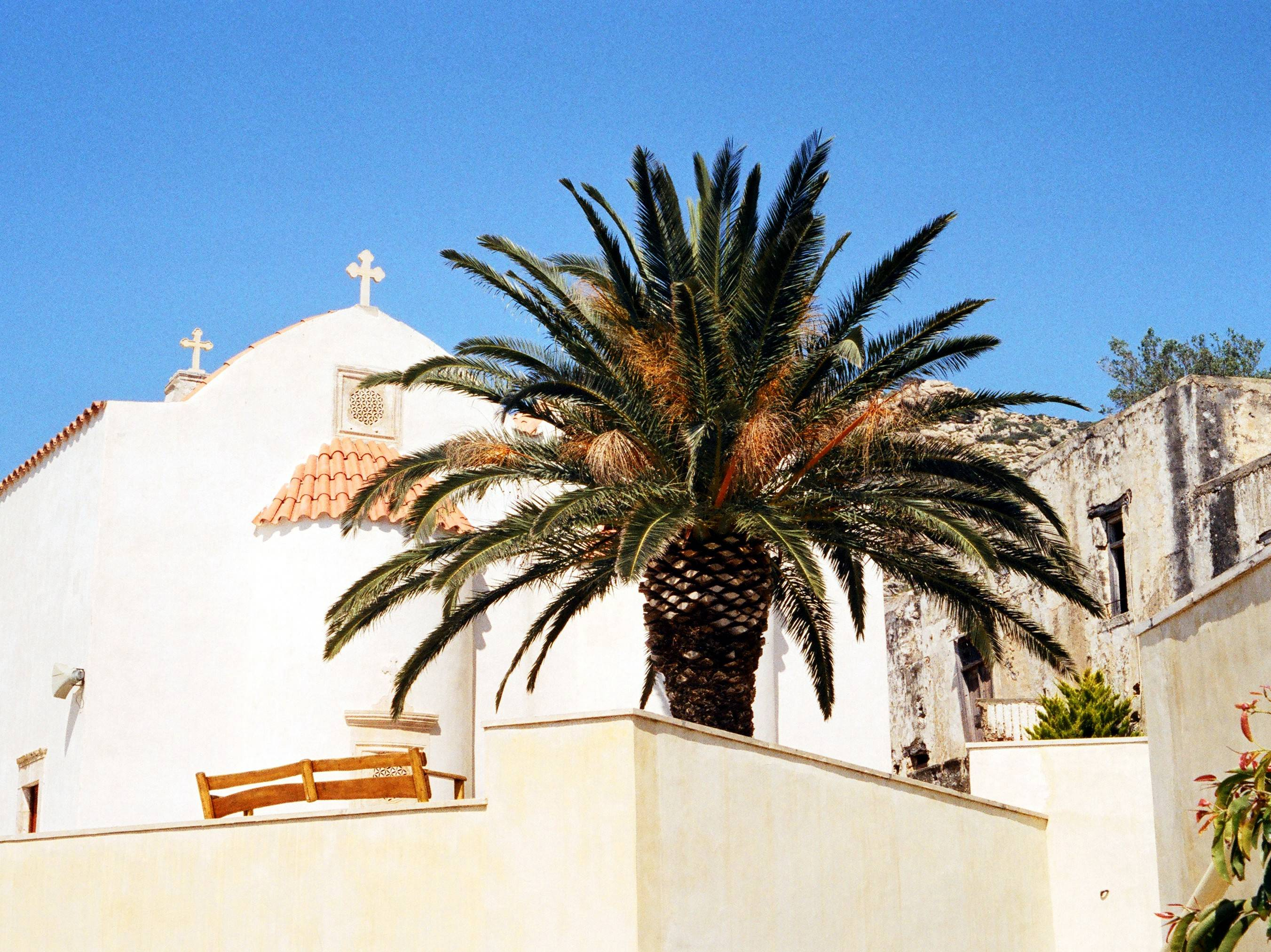 Mönchskloster Moni Preveli, Kreta (Griechenland)